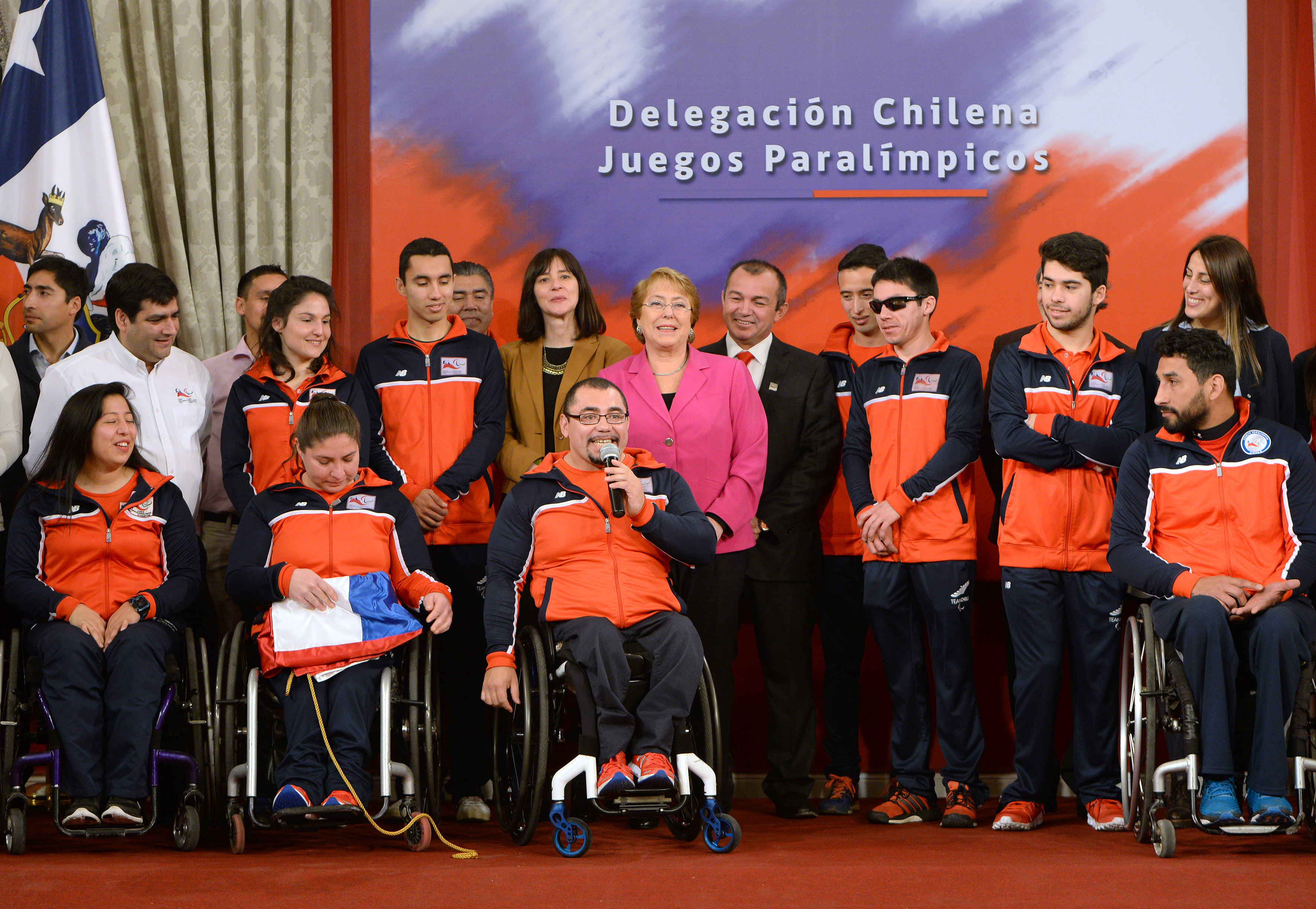 Gobierno de Chile